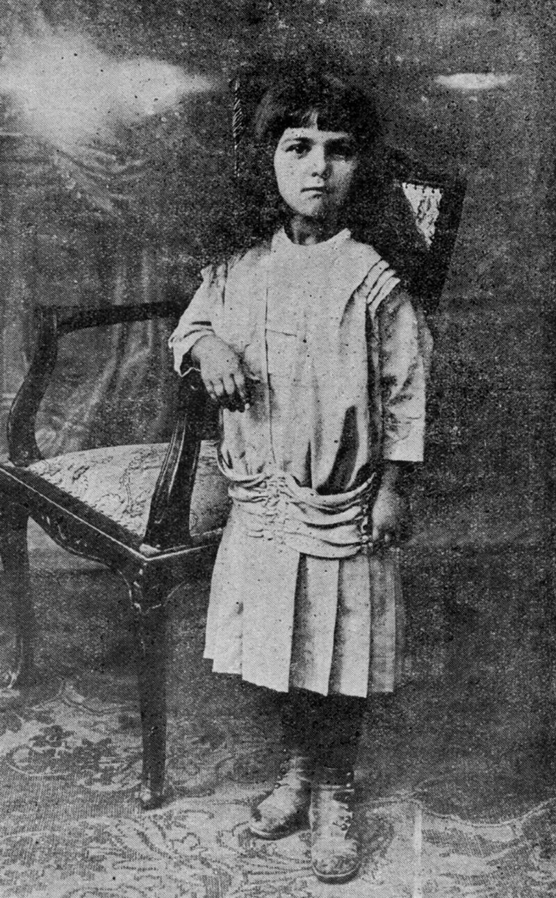 Vaska Zoitcheva